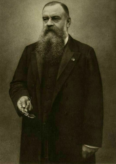 Anonieme prent (fotolitho / fotogravure?), begin 20ste eeuw. Deze prent is afkomstig uit de door de kunstenaar zelf aangelegde Atlas Grolman.